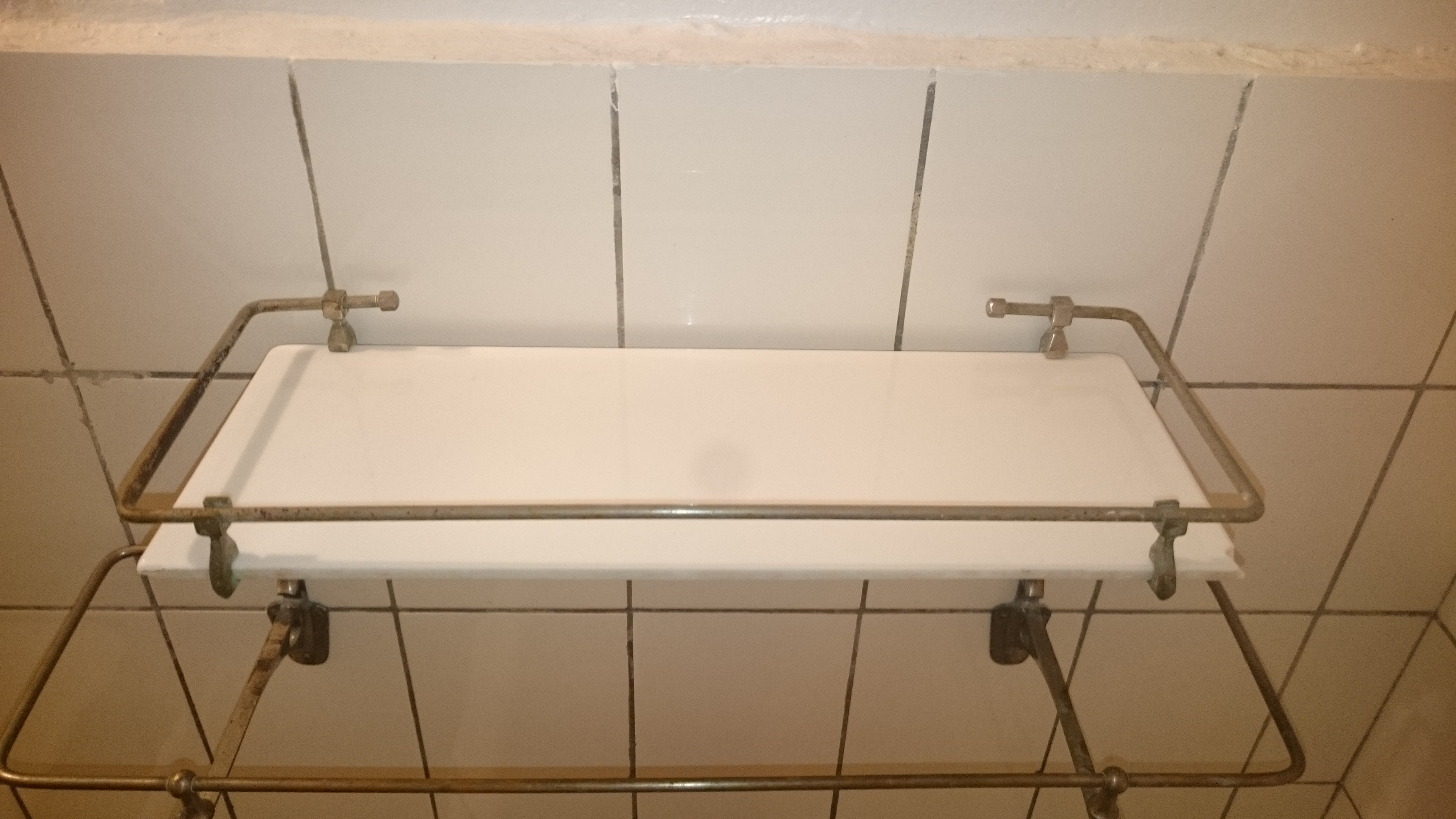 Průzkum poličky v koupelně. Praha, Česká republika.